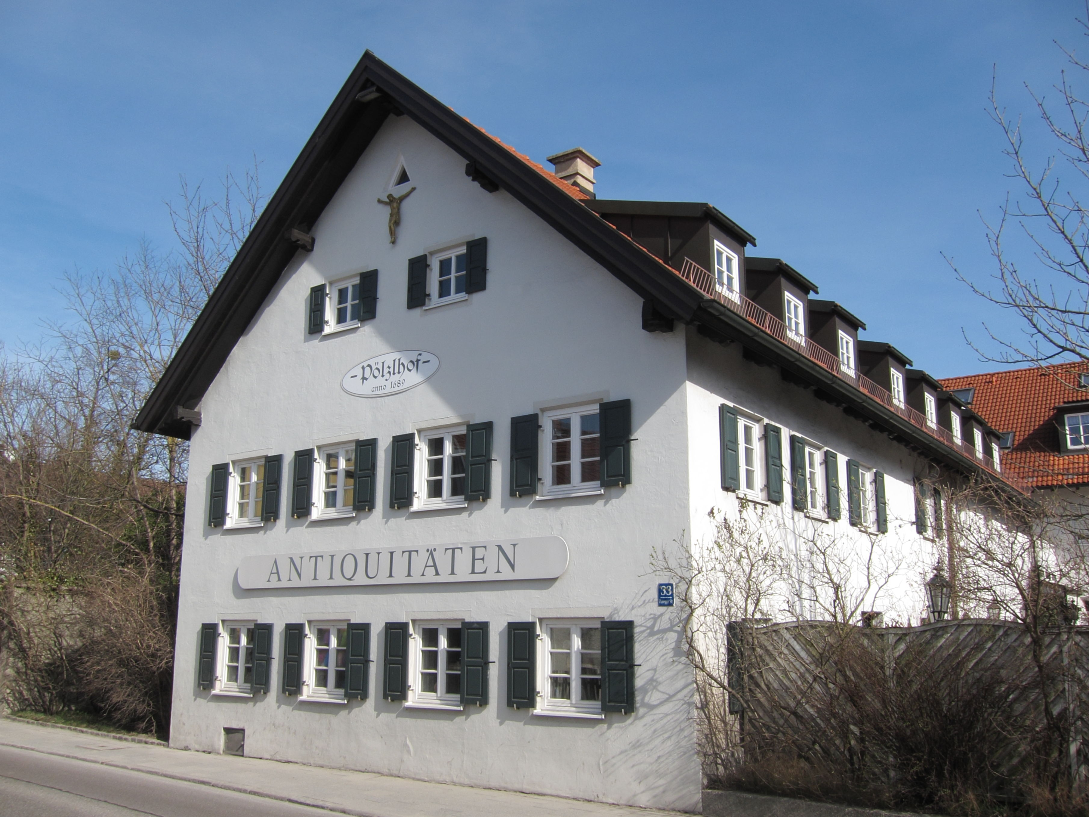 Planegger Straße 33; Ehem. Bauernhaus, 19. Jh., verändert.